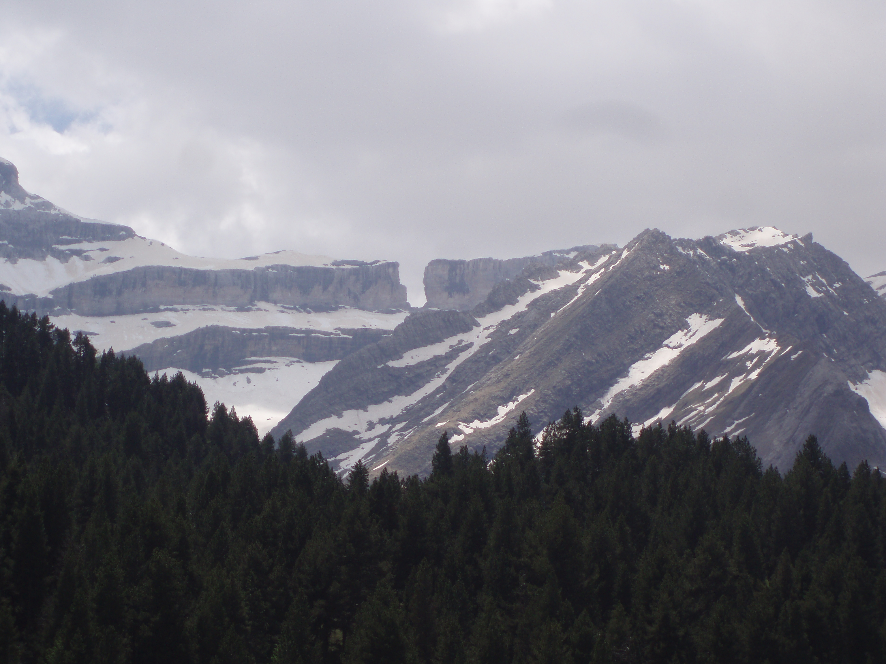 La Brèche de Roland dans les Pyrénées